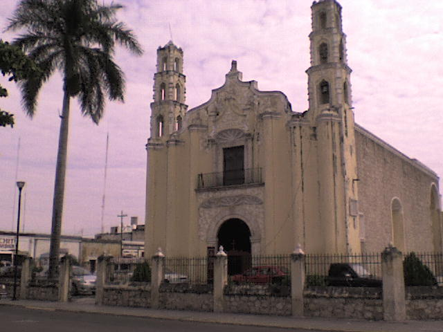 Iglesia de San Juan, Mérida, México